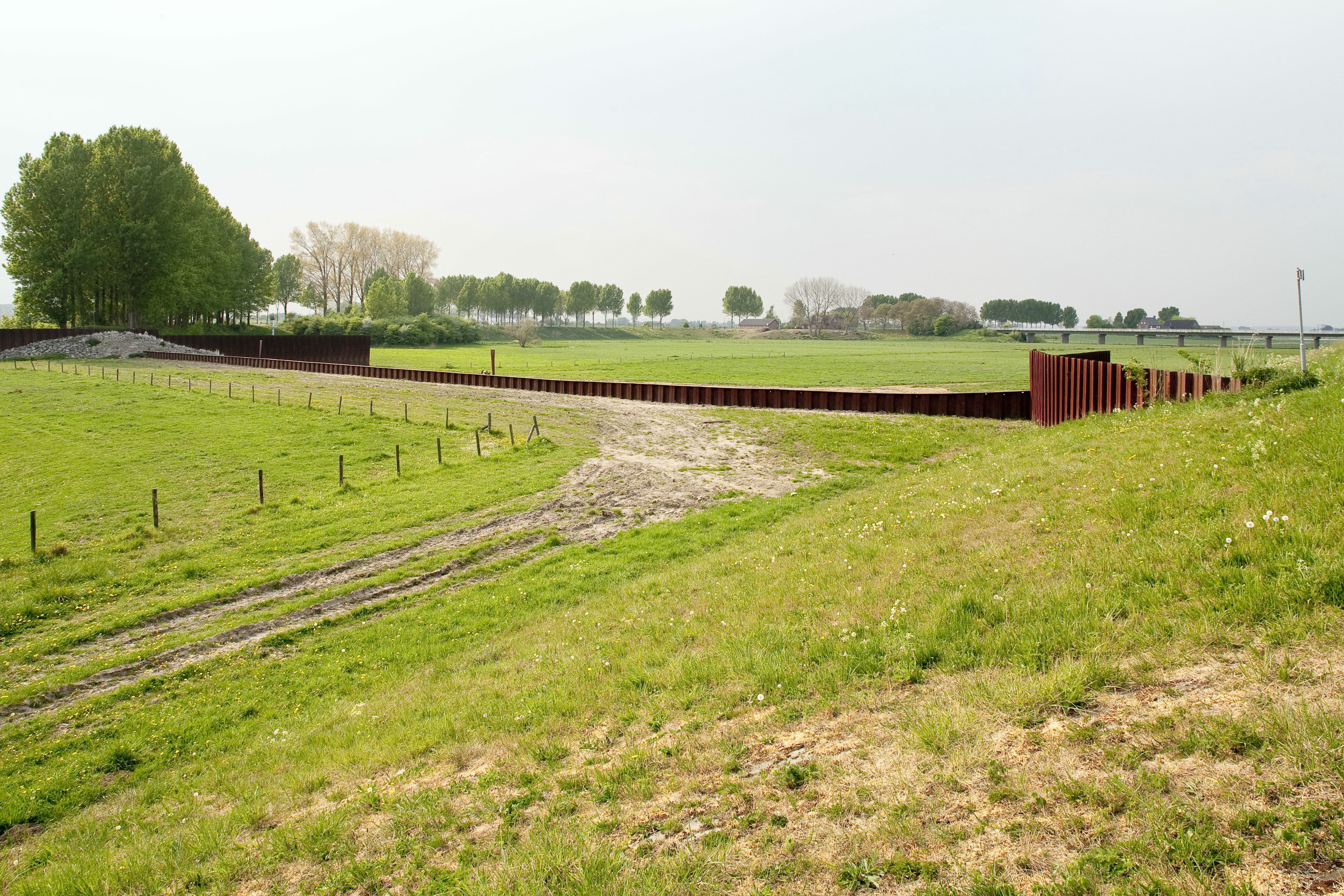 Pannerdense overlaat: Overzicht (opmerking: Publicatie: TRAP Pannerdensch Kanaal (Cultuurhistorische Routes in Nederland - 58))